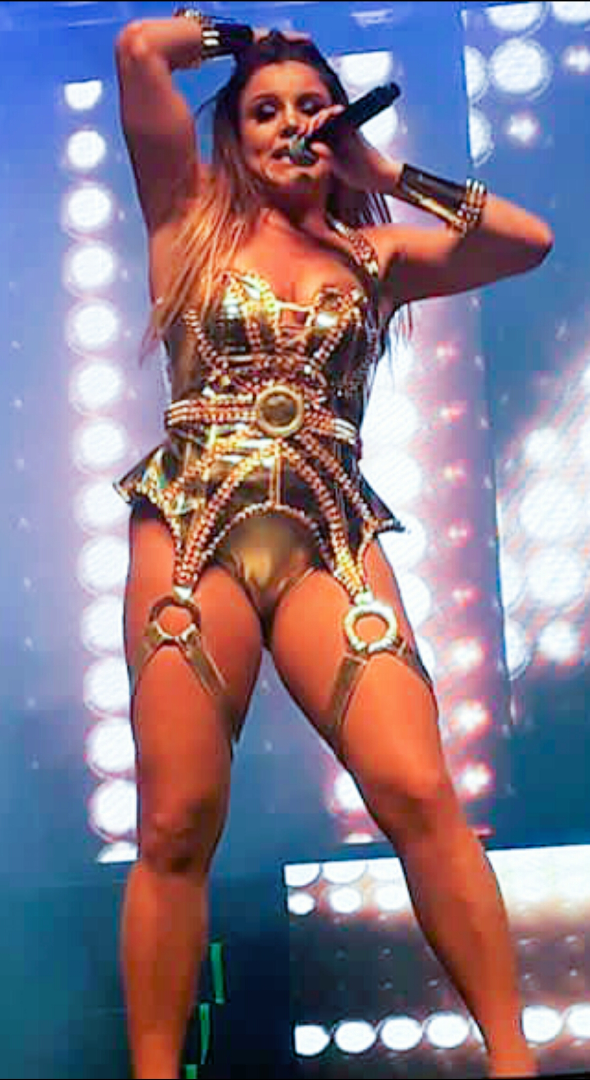 Fantine na turnê 'Rouge 15 Anos', em 2018.